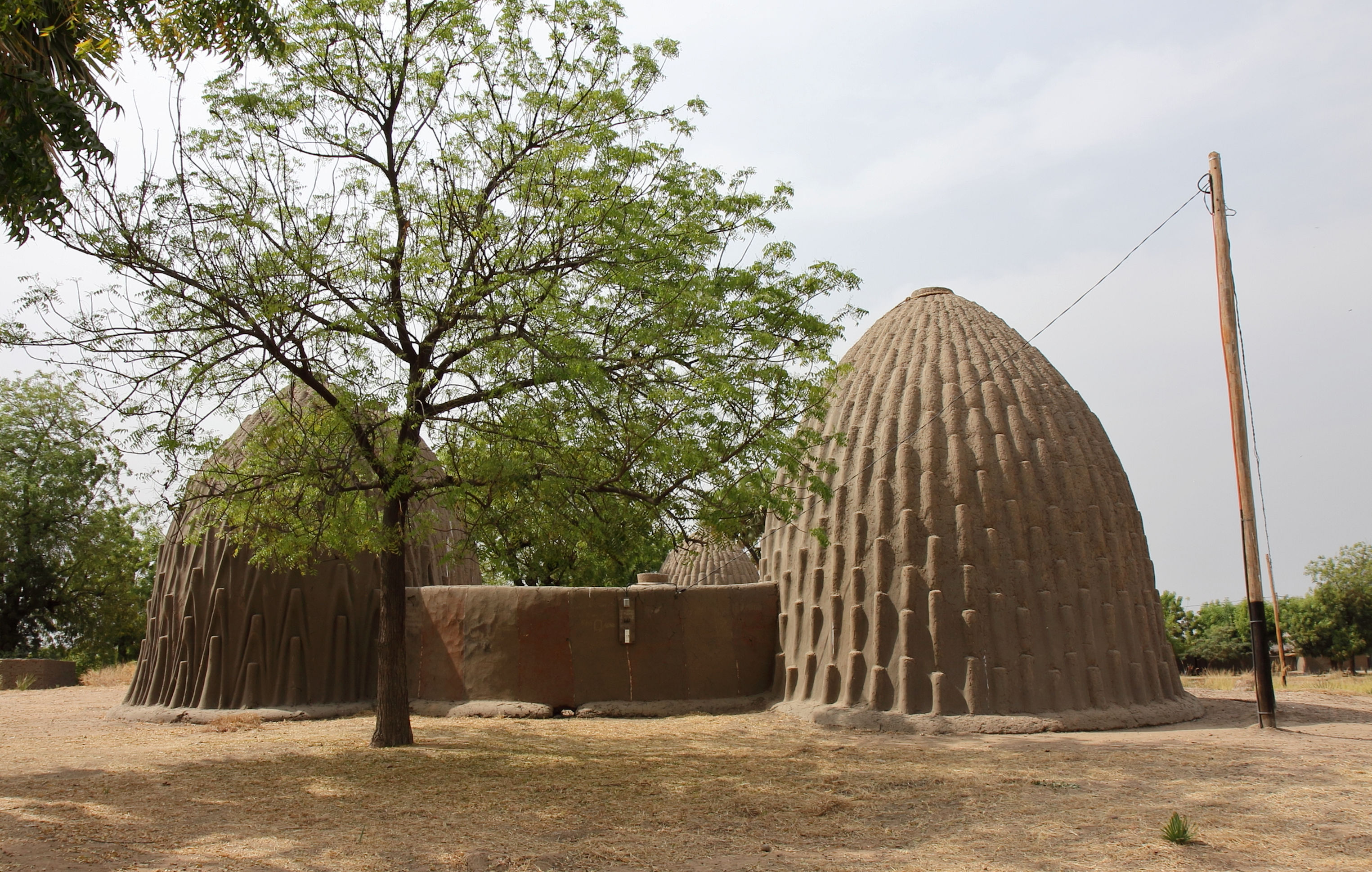 Habitation mousgoum de Pouss dans l’extrême nord ; l'arrière